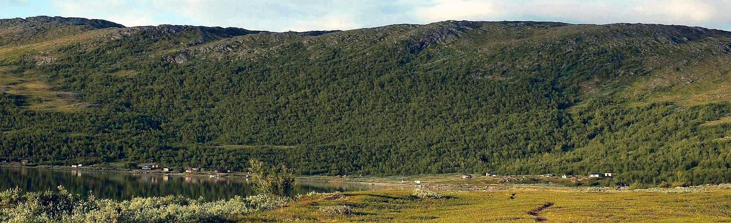 Staloloukta in Padjelanta National Park